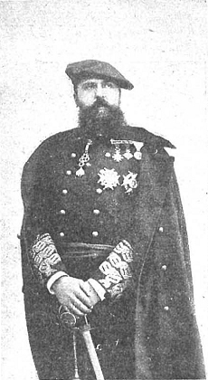 Retrato de Carlos de Borbón, publicado en la revista española Nuevo Mundo.